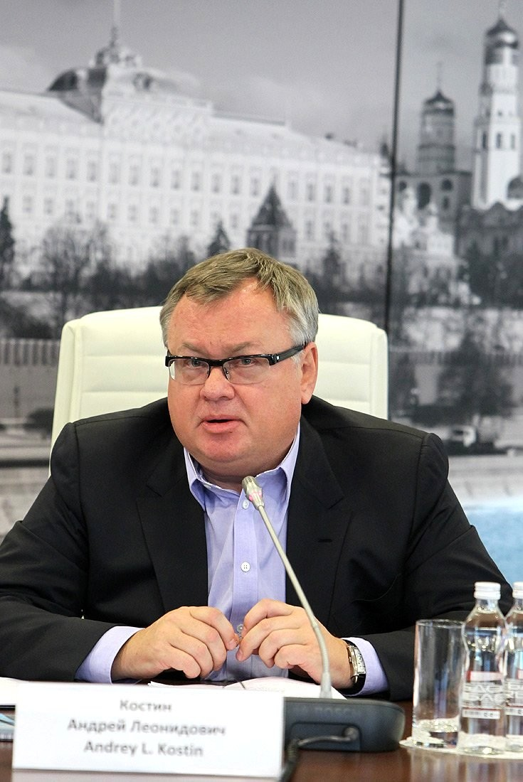 Андрей Костин 2012